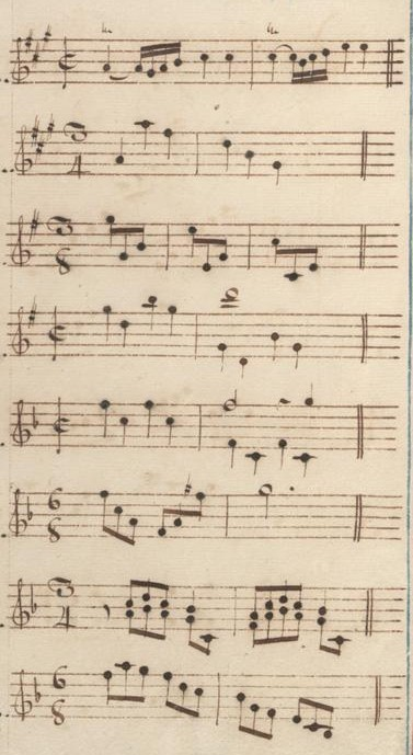 Table du volume XIII des manuscrits de Venise (incipit des sonates 23 à 30, K. 536 à 543).